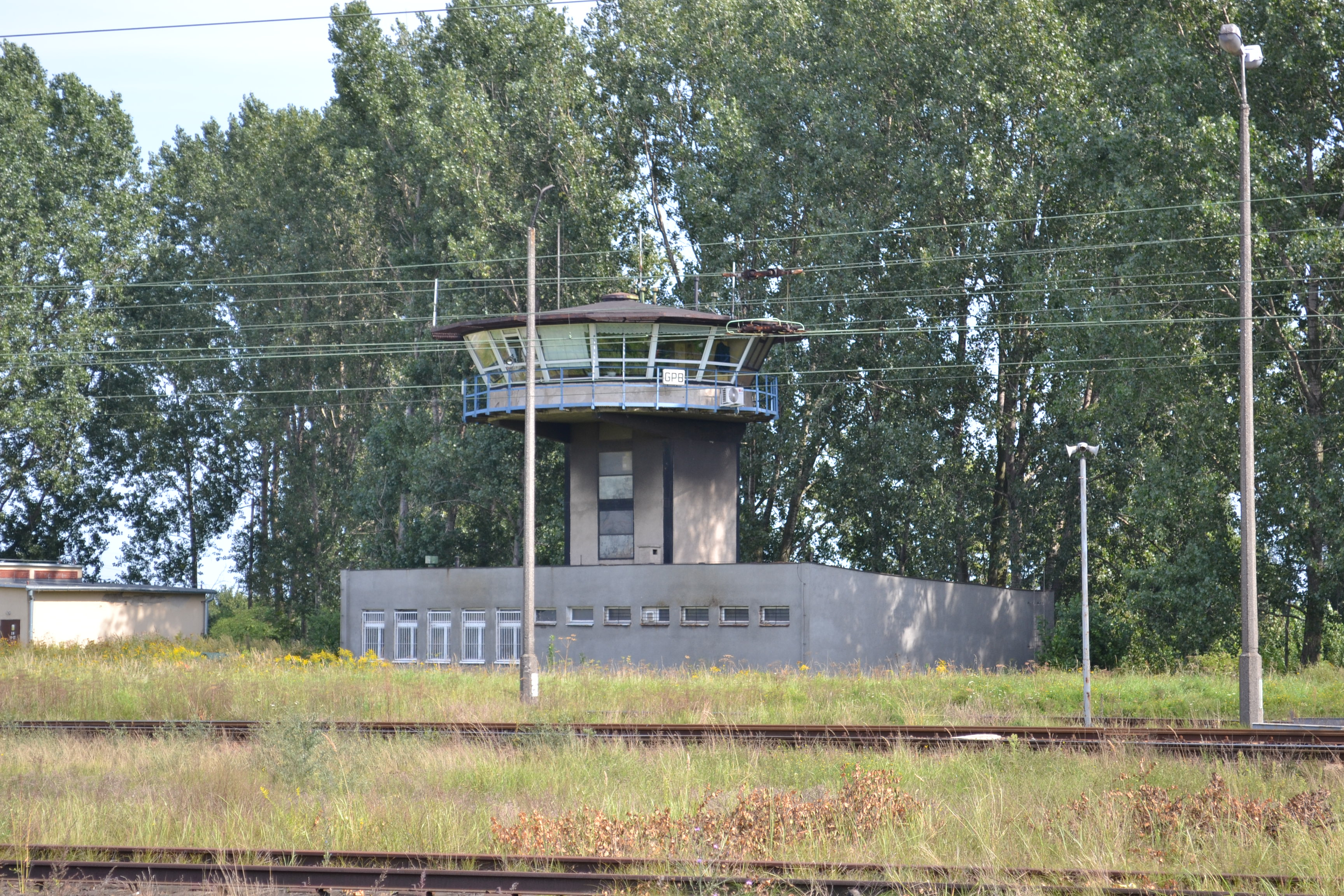 nastawnia GPB w Gdańsku Porcie Północnym